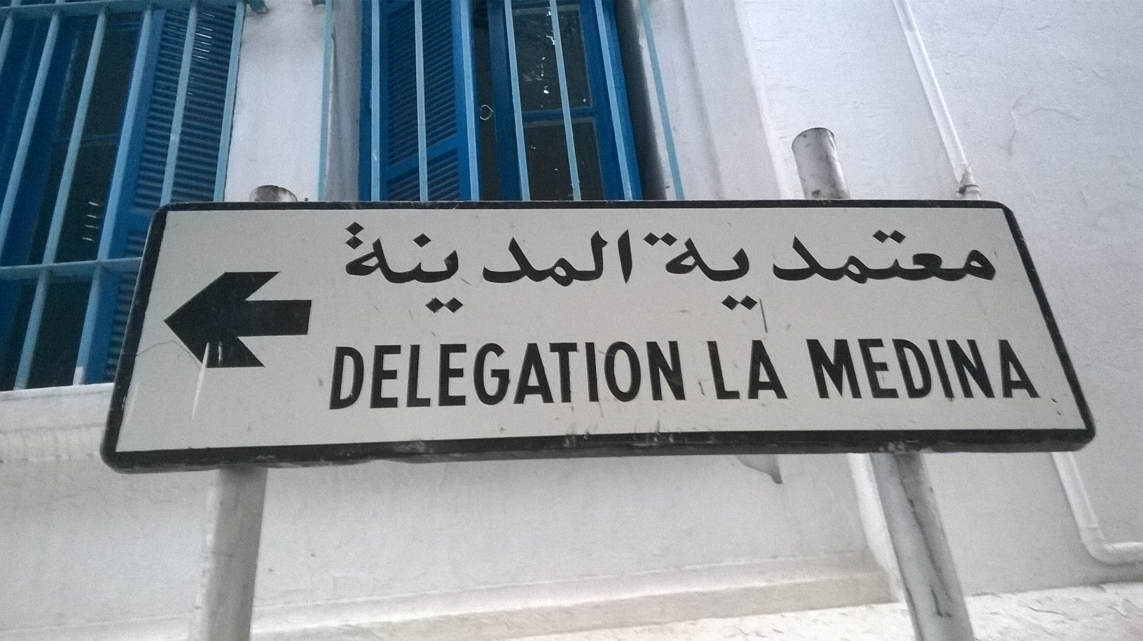 La médina de Tunis مدينة تونس العتيقة